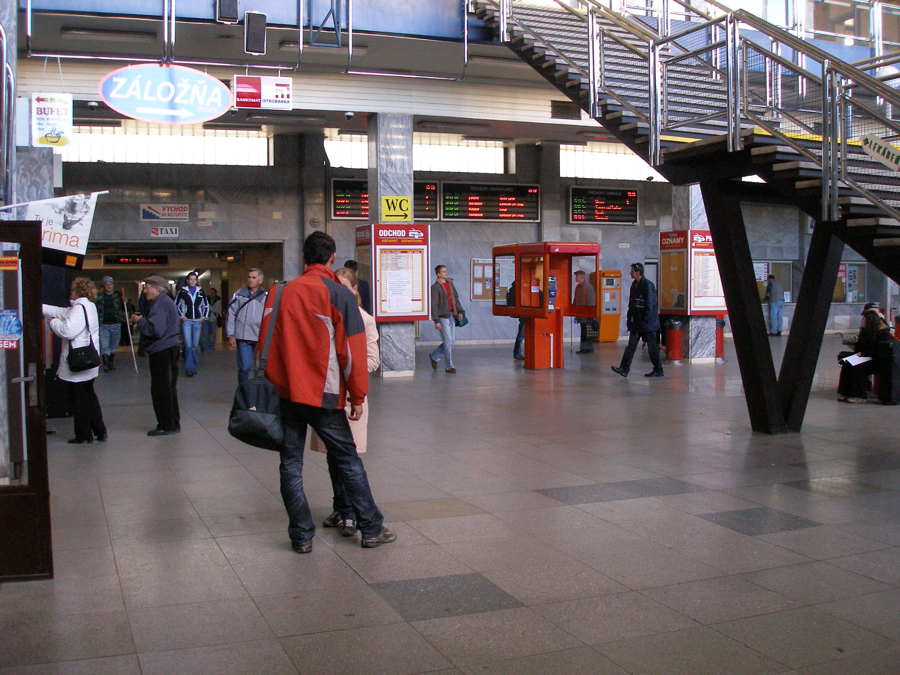 Vestibul železničná stanica v krajskom meste Prešov, región Šariš